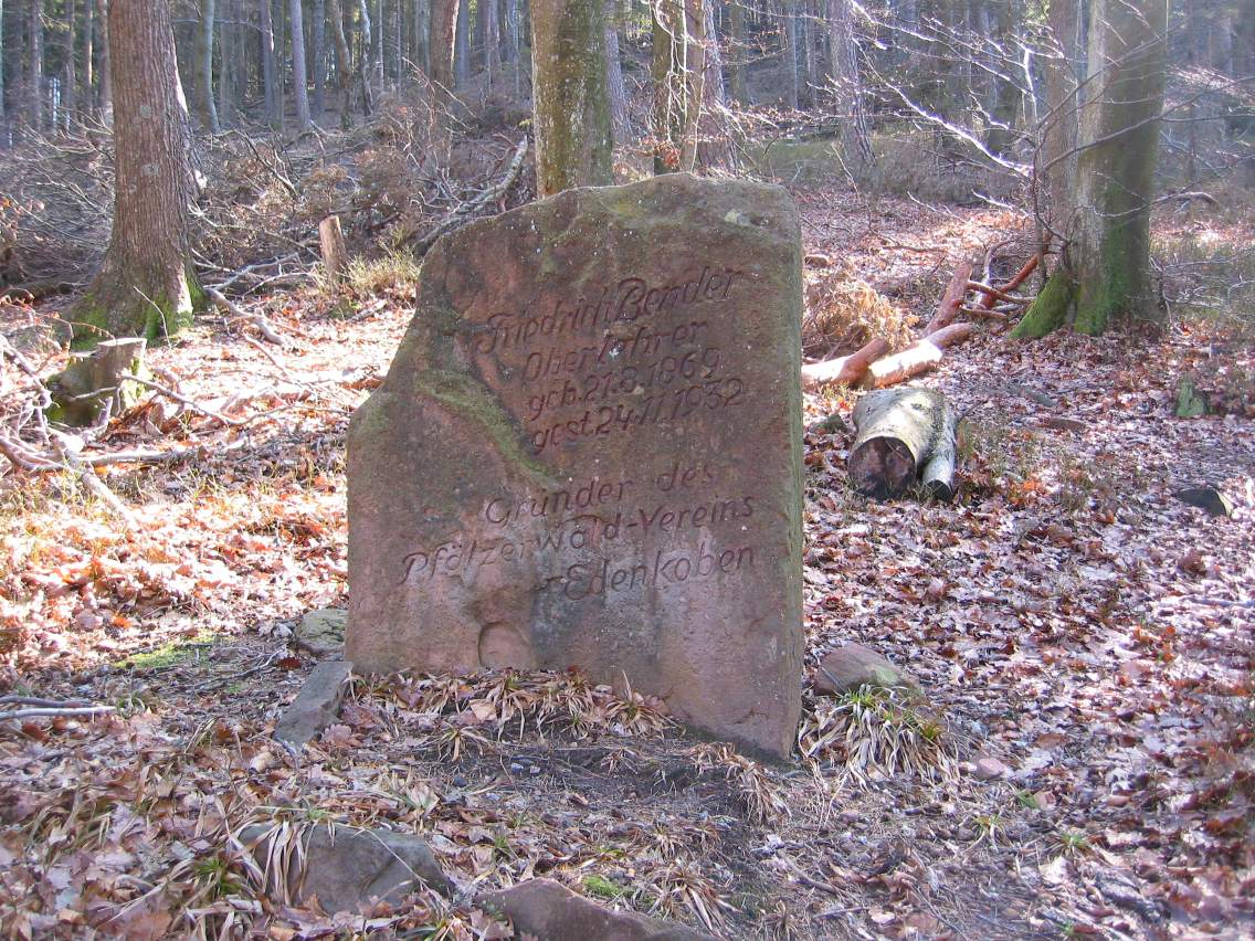 Ritterstein Nummer 241, Bender-Platz - Friedrich Bender